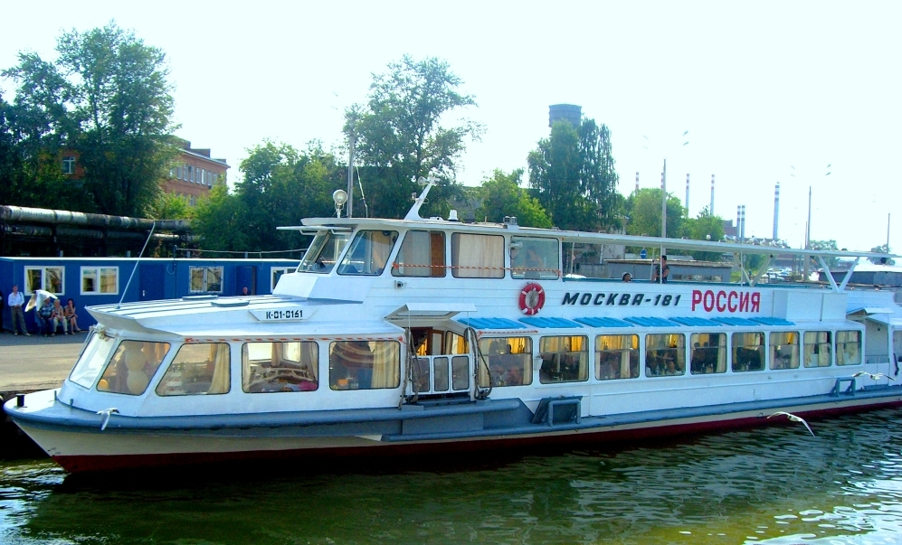 Ŝipo K-01-0161 «Moskva-181» (Москва-181)